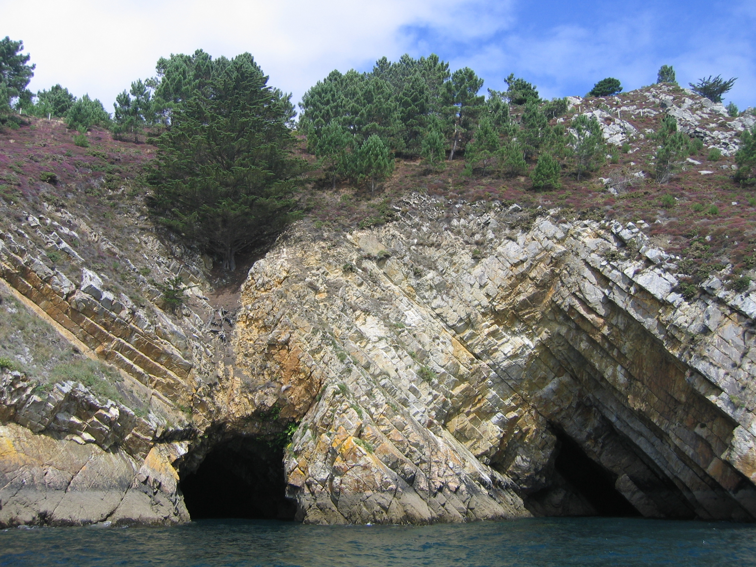 Visite en bateau des grottes de Morgat.